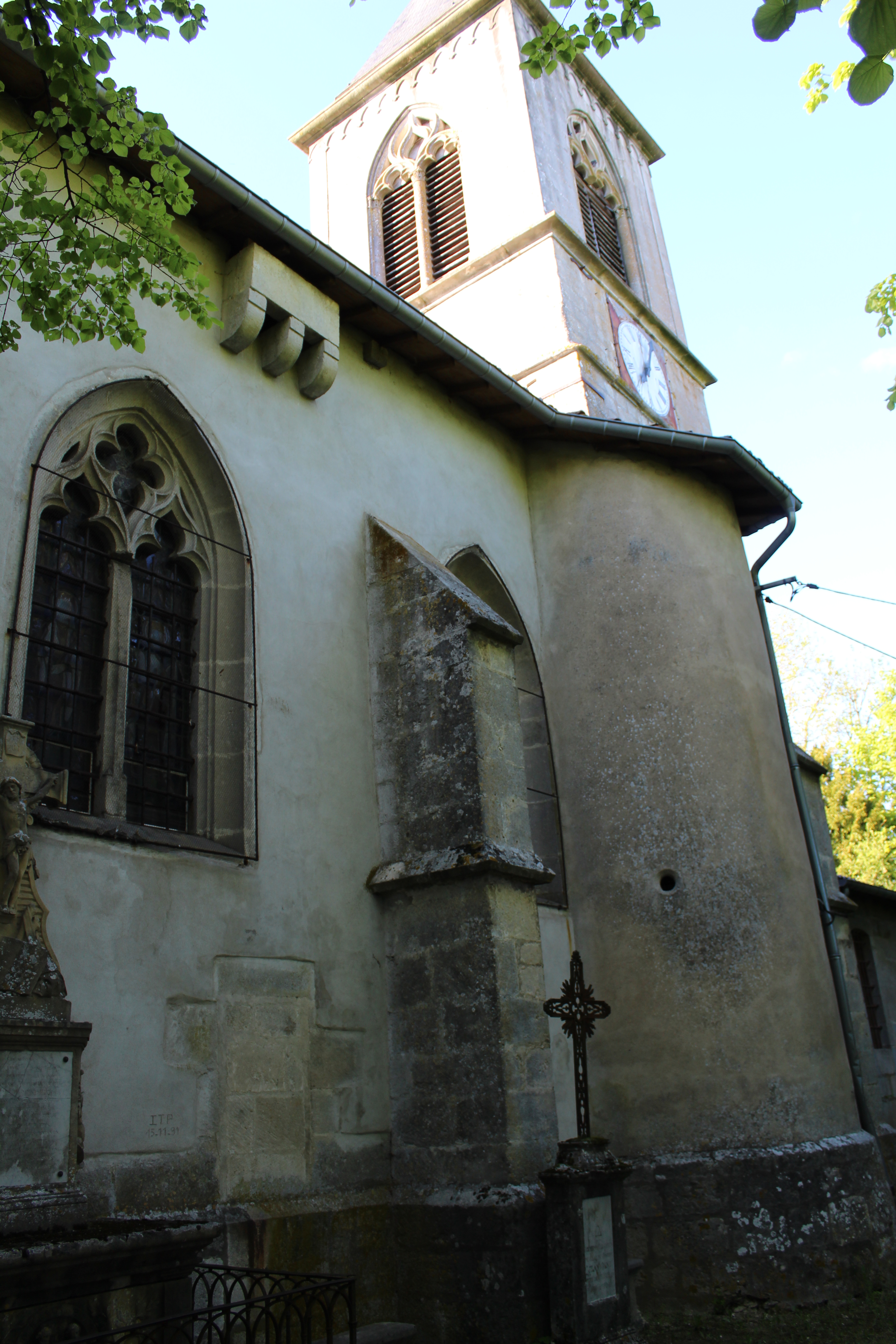 Eglise de creuë, fortifications